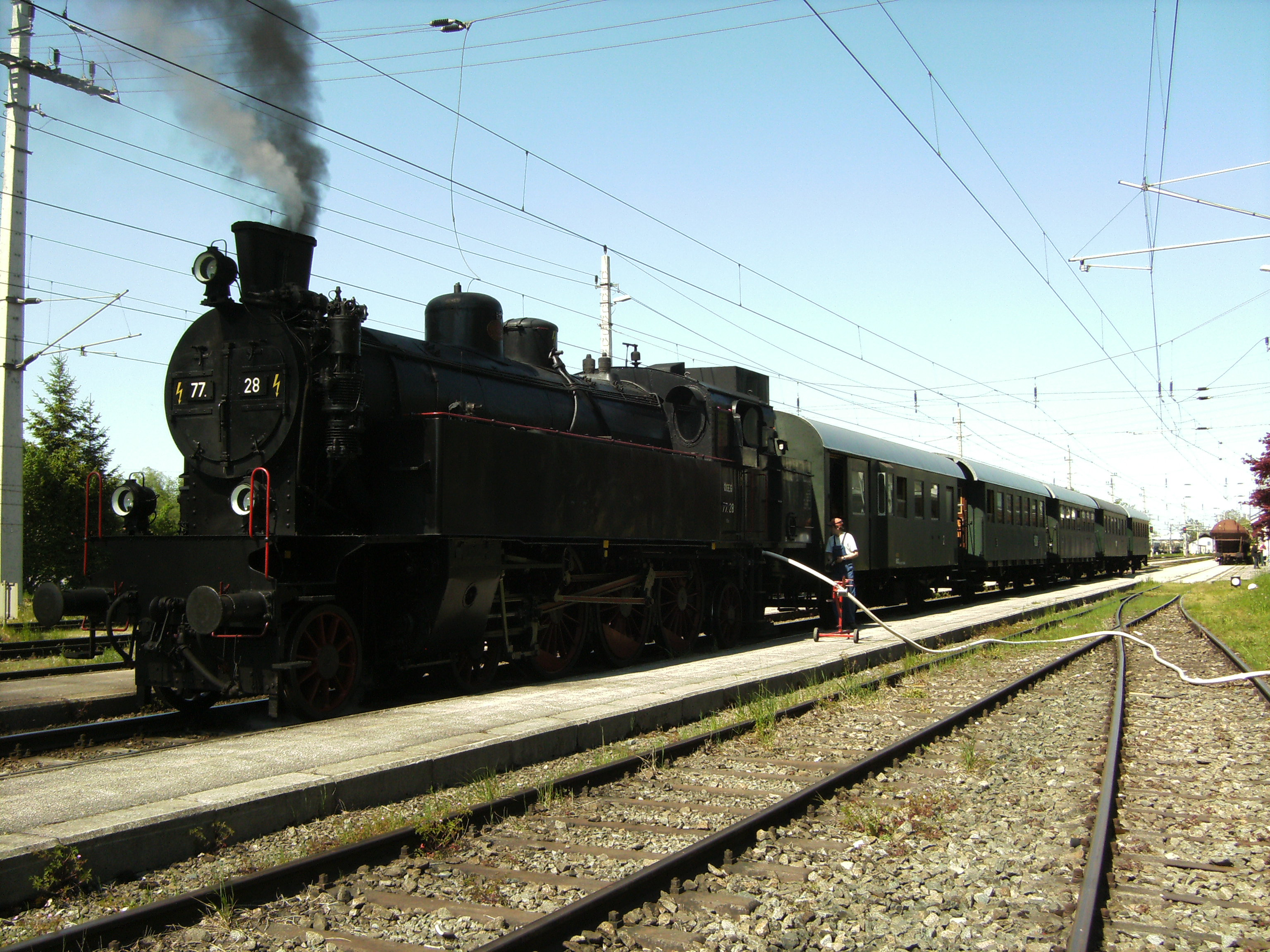 Halt eines Sonderzugs im Bahnhof Gmunden anlässlich der oberösterreichischen Landesausstellung, bespannt mit 77.28 der ÖGEG